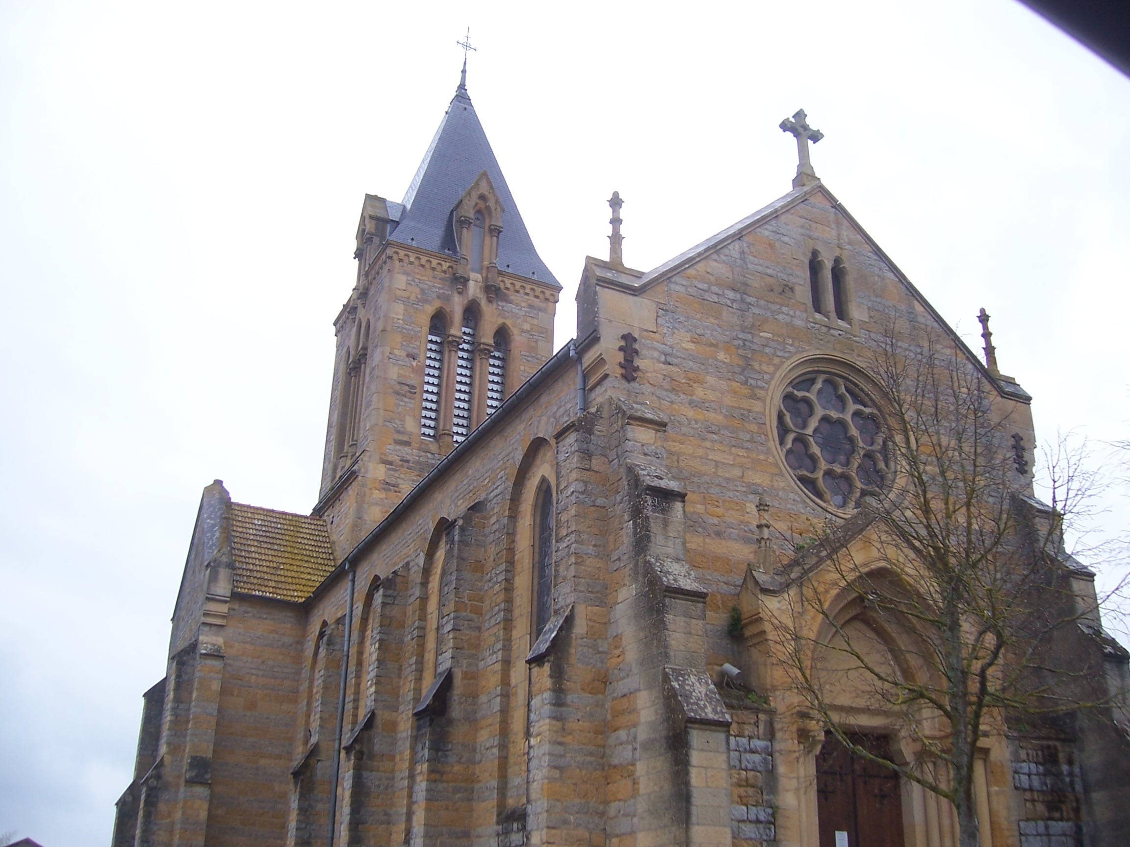 Eglise de Volsesvres